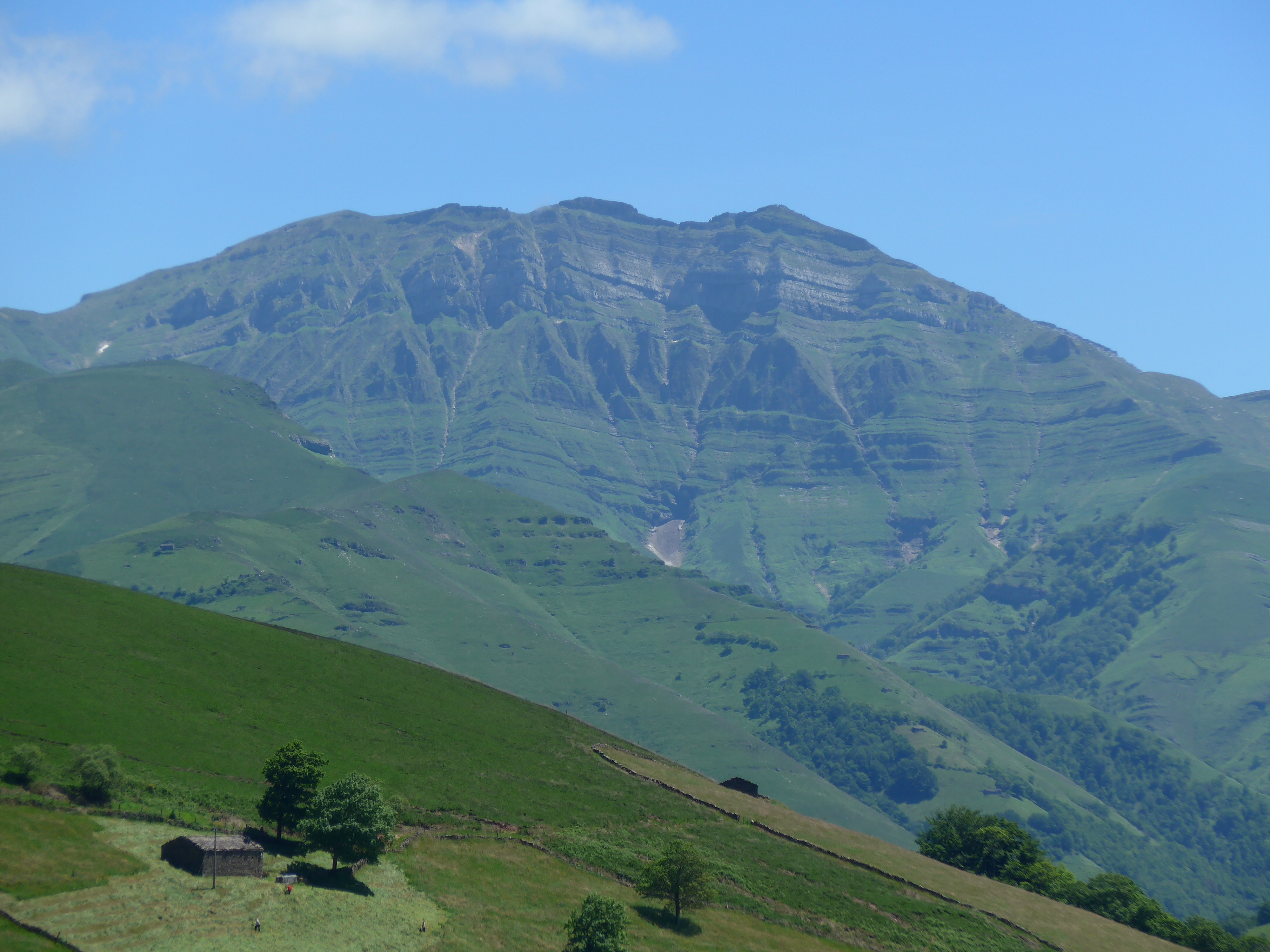 El Castro Valnera (1718 m) es la máxima elevación de las montañas pasiegas.